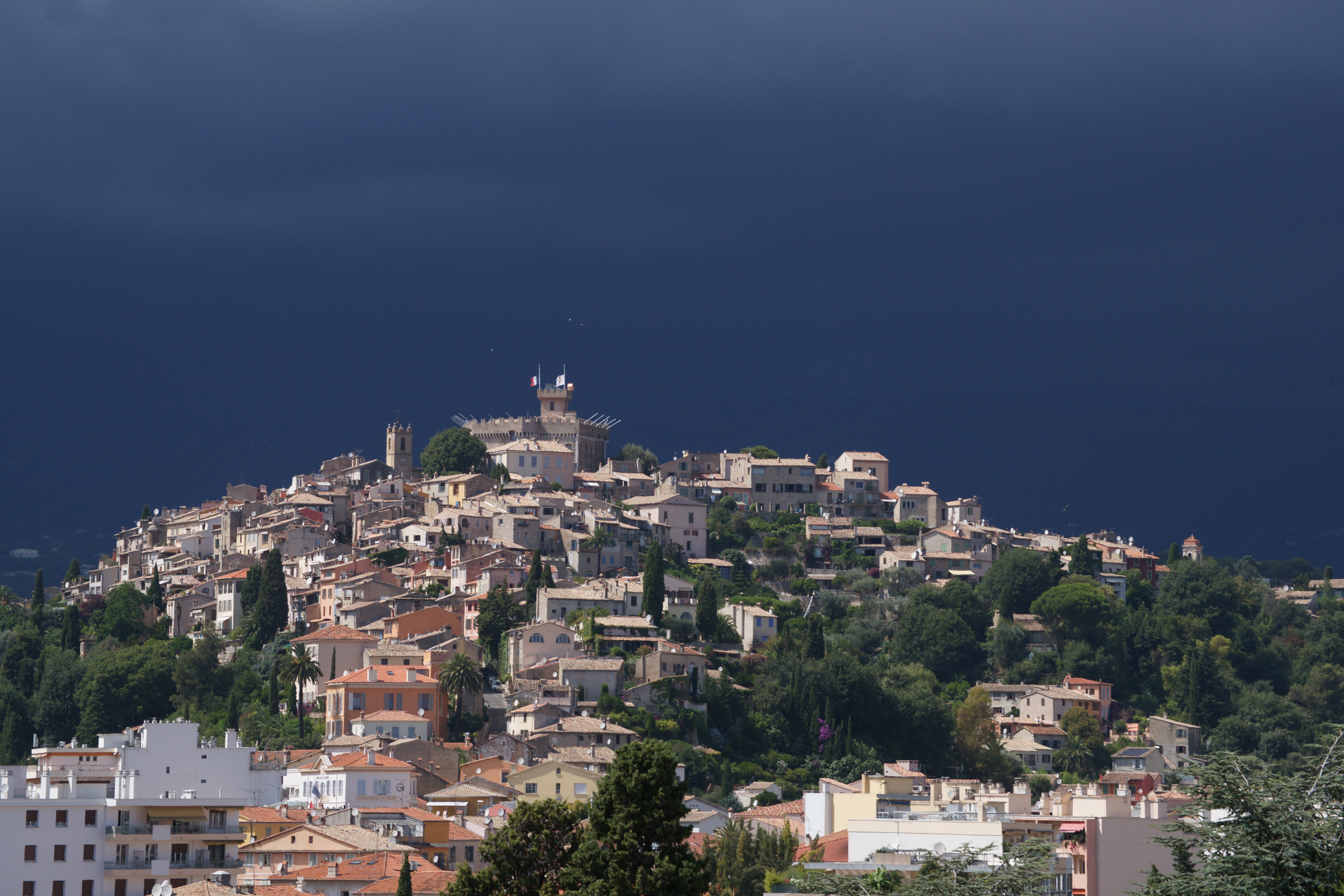 Haut de Cagnes, Cagnes-sur-Mer, 2014